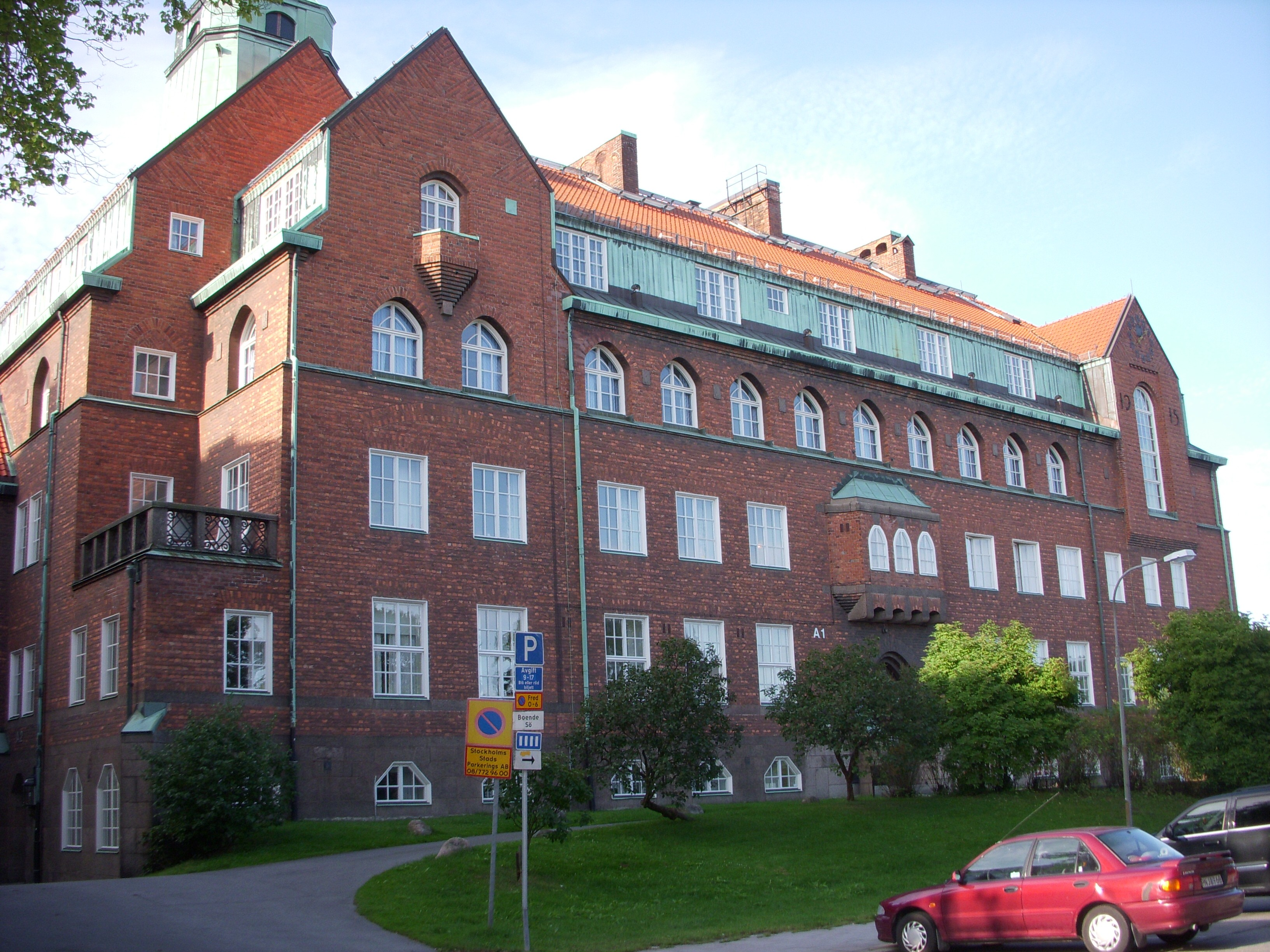 Frans Schartaus handelsinstitur vid Stigbergsgatan i Stockholm